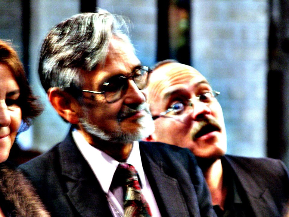 Omar Duranböger